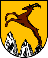 Gemeinde Tamsweg: Im goldenen Schild drei spitzige, naturfarbige, von rechts nach links ansteigende Felsen nebeneinander. Von der rechten Felsspitze springt ein brauner Alpensteinbock über die beiden anderen Felsspitzen hinweg